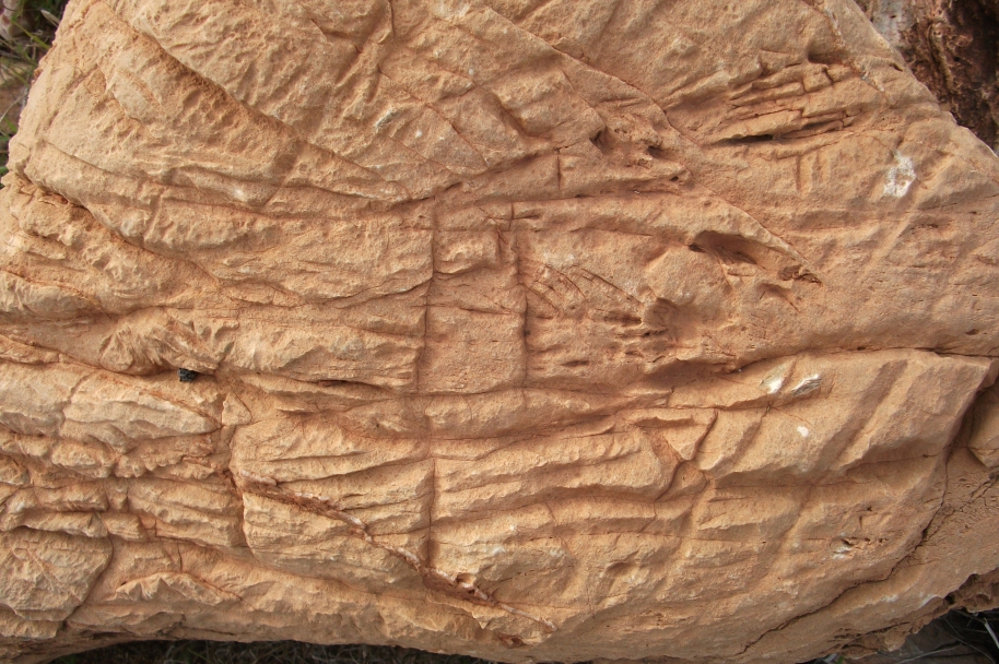 Antiatlas, Stein_mit_'Einritzungen'